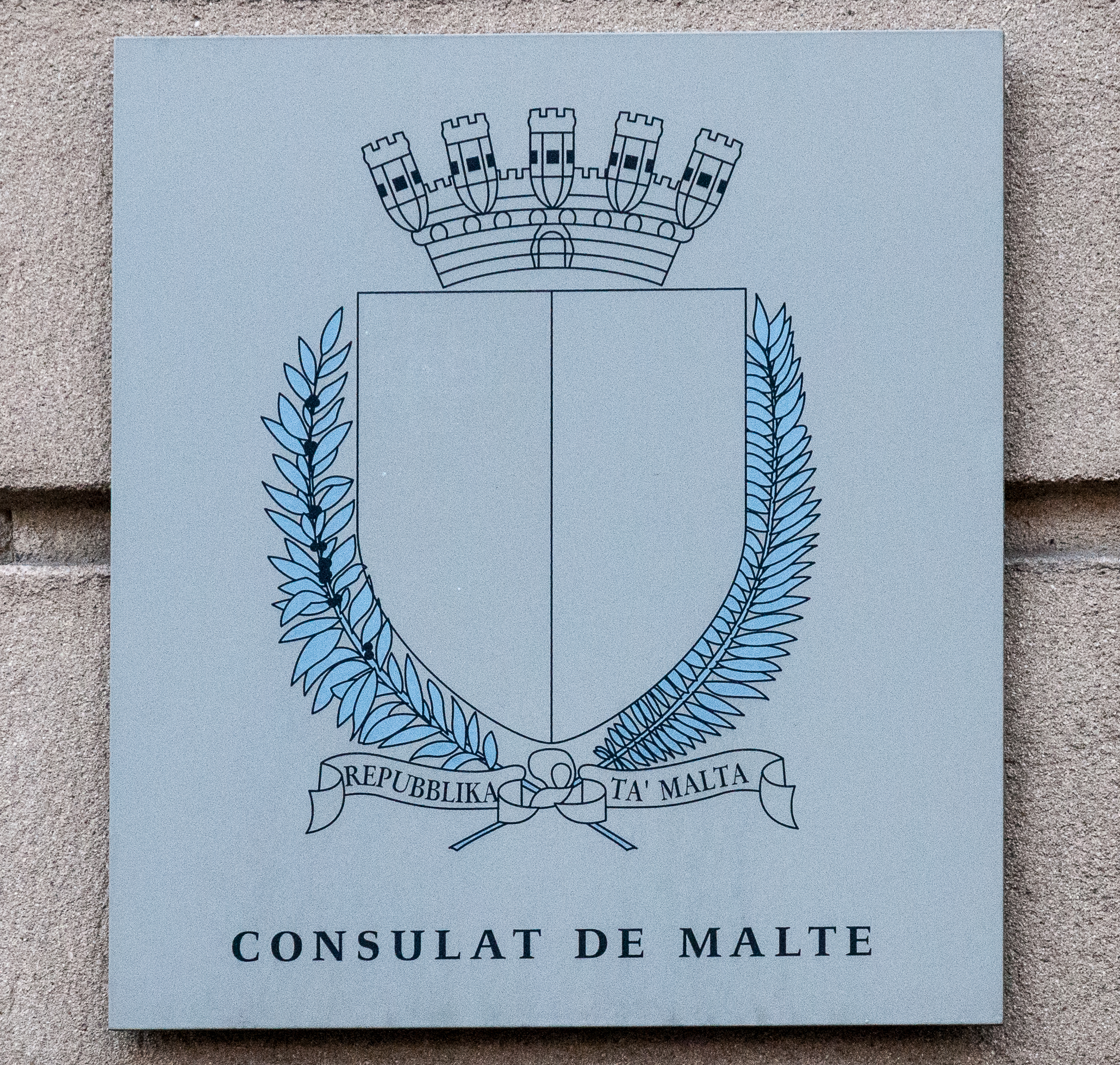 Op Nr 8 an der Zithastrooss an der Stad ass och d'Konsulat vu Malta ënnerbruecht.